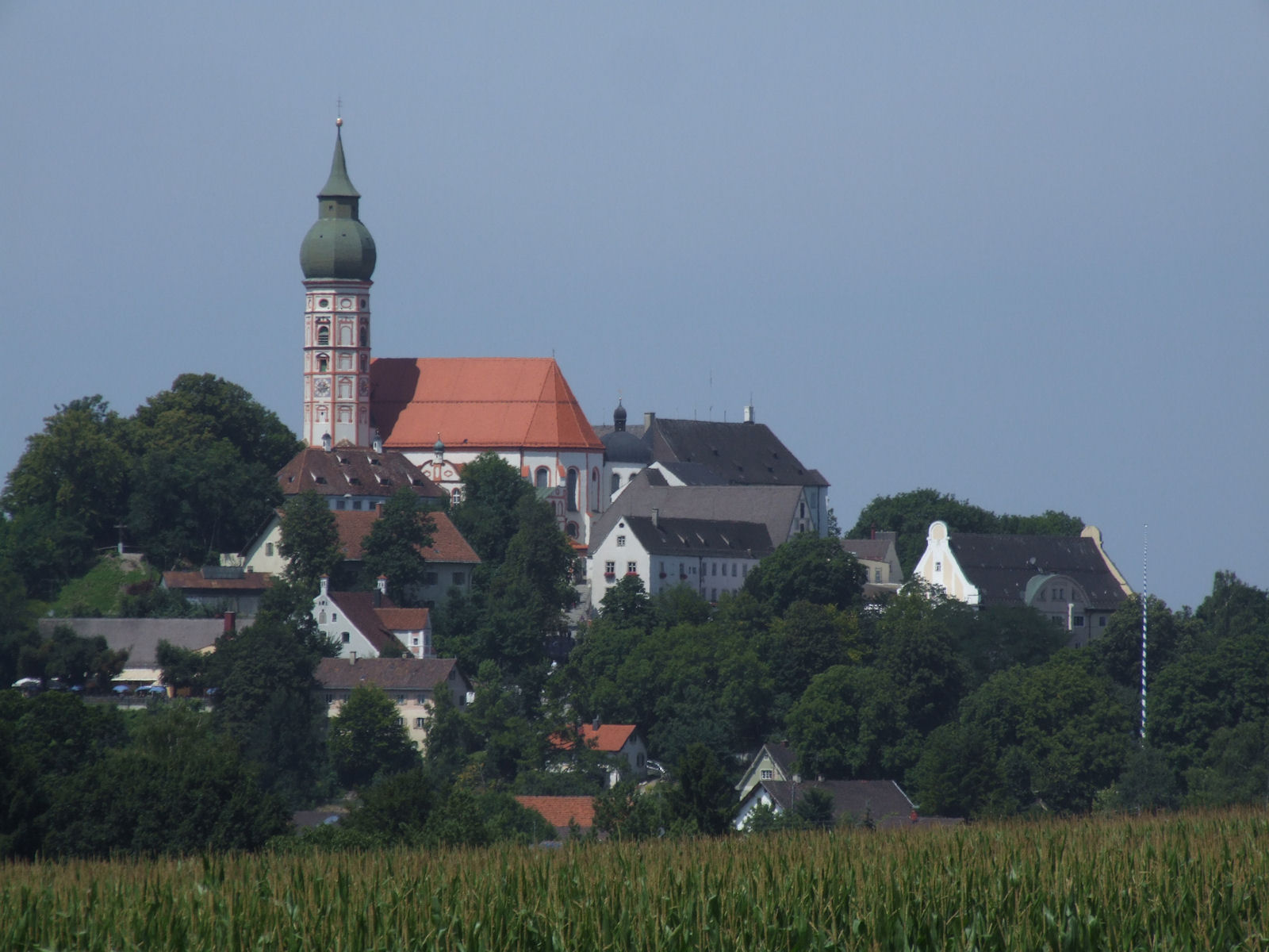 Andechs Abbey on “Heiligen Berg”, Starnberg, Bavaria, Germany